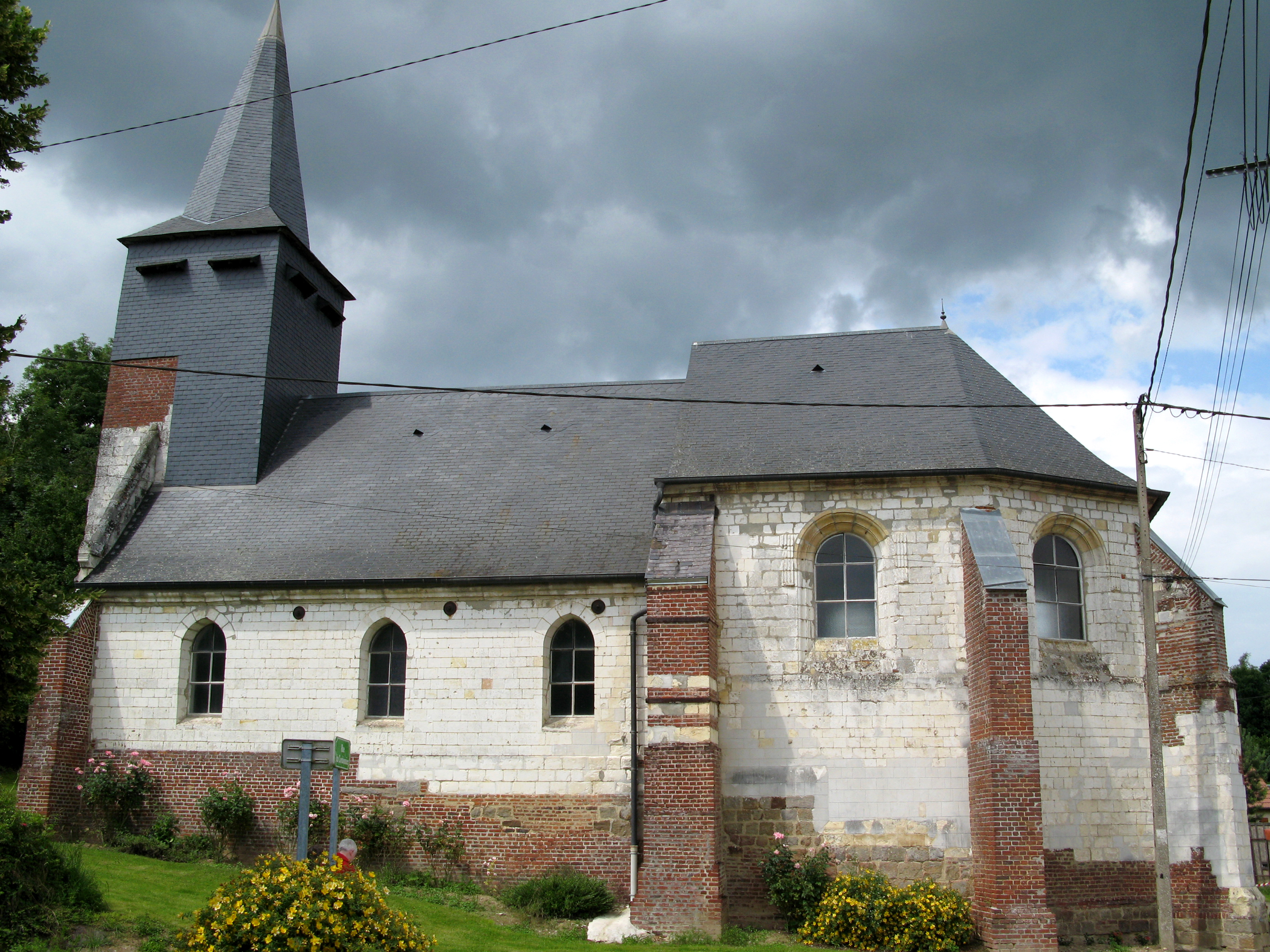 Bresle (Somme, France) - L'église Saint-Léger. On remarque les nombreuses modifications (en particulier par l'emploi de la brique), réalisées manifestement dans l'urgence et pour des raisons "économiques", budgétaires (comme par exemple aussi le zinc employé au lieu de l'ardoise sur le versant de 2 piliers-contreforts), l'assise typique des murs en grès (quand elle n'a pas été modifiée) les fenêtres du choeur qui comportent encore des traces d'un encadrement décoratif (pierres à rainures verticales), l'environnement "assez catastrophique" d'une profusion de fils électriques aériens.